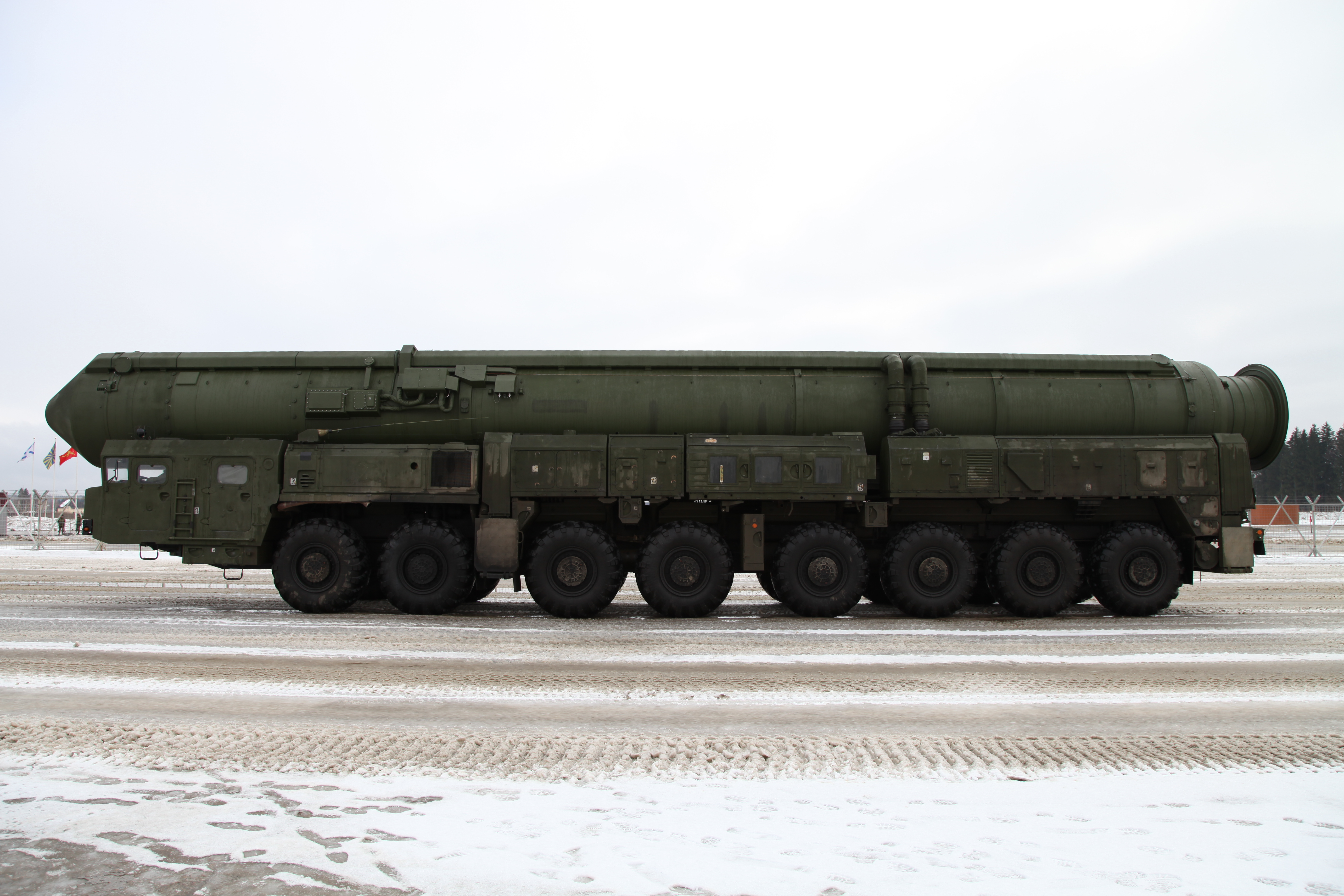 РТ-2ПМ2 Тополь-МTiếng Việt: RT-2PM2 «Topol-М»